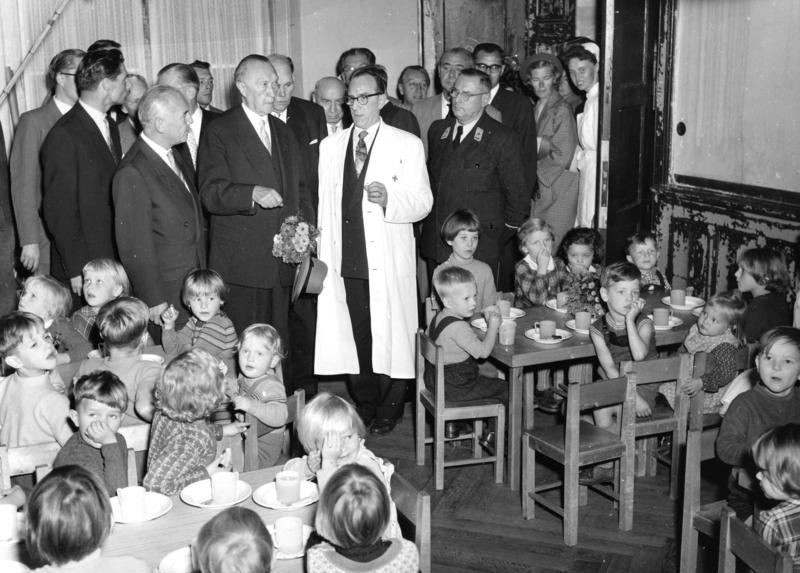 3.10.1958 Bundeskanzler Konrad Adenauer besucht den Kindergarten des Flüchtlingslagers am Gardeschützenweg in Berlin-Lichterfelde